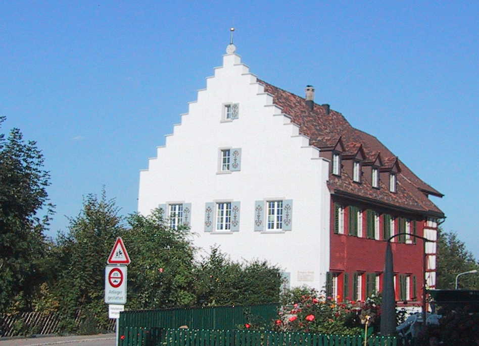 Rellingsches Schlösschen, Ermatingen, Kanton Thurgau